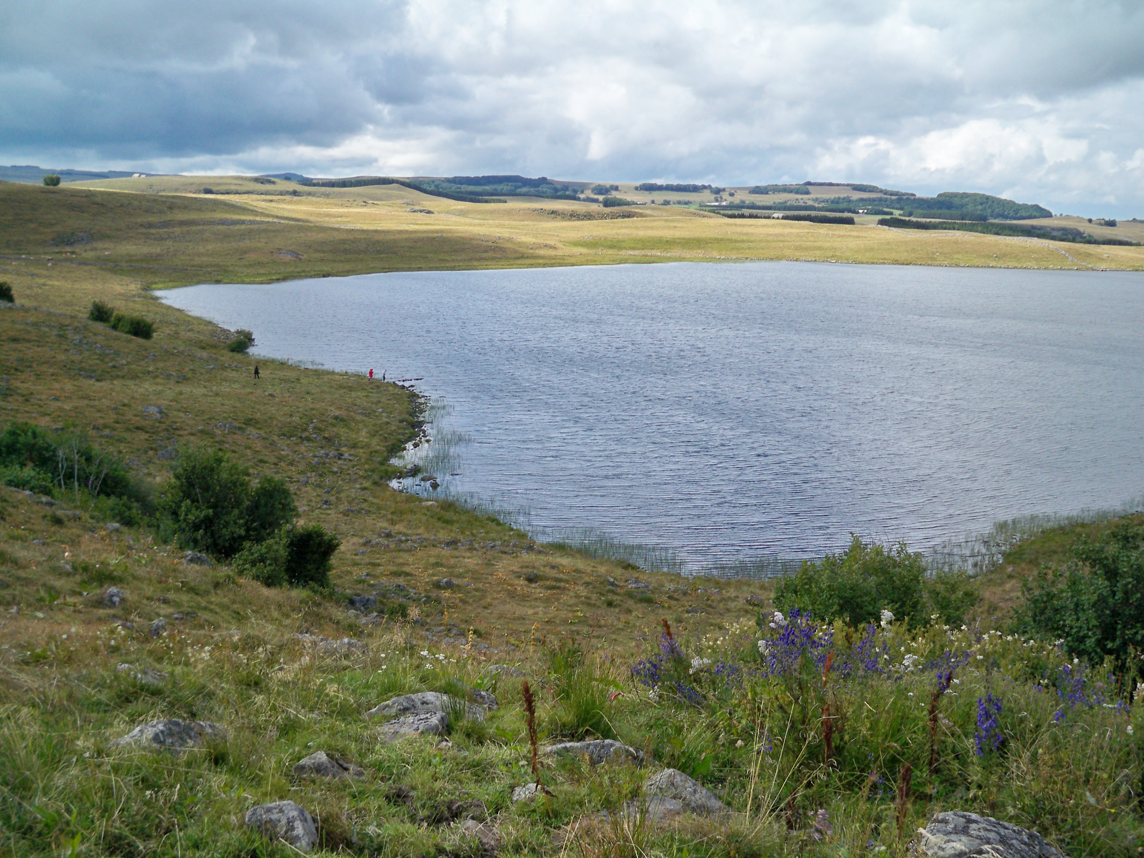 Lac de St Andéol - Lozère